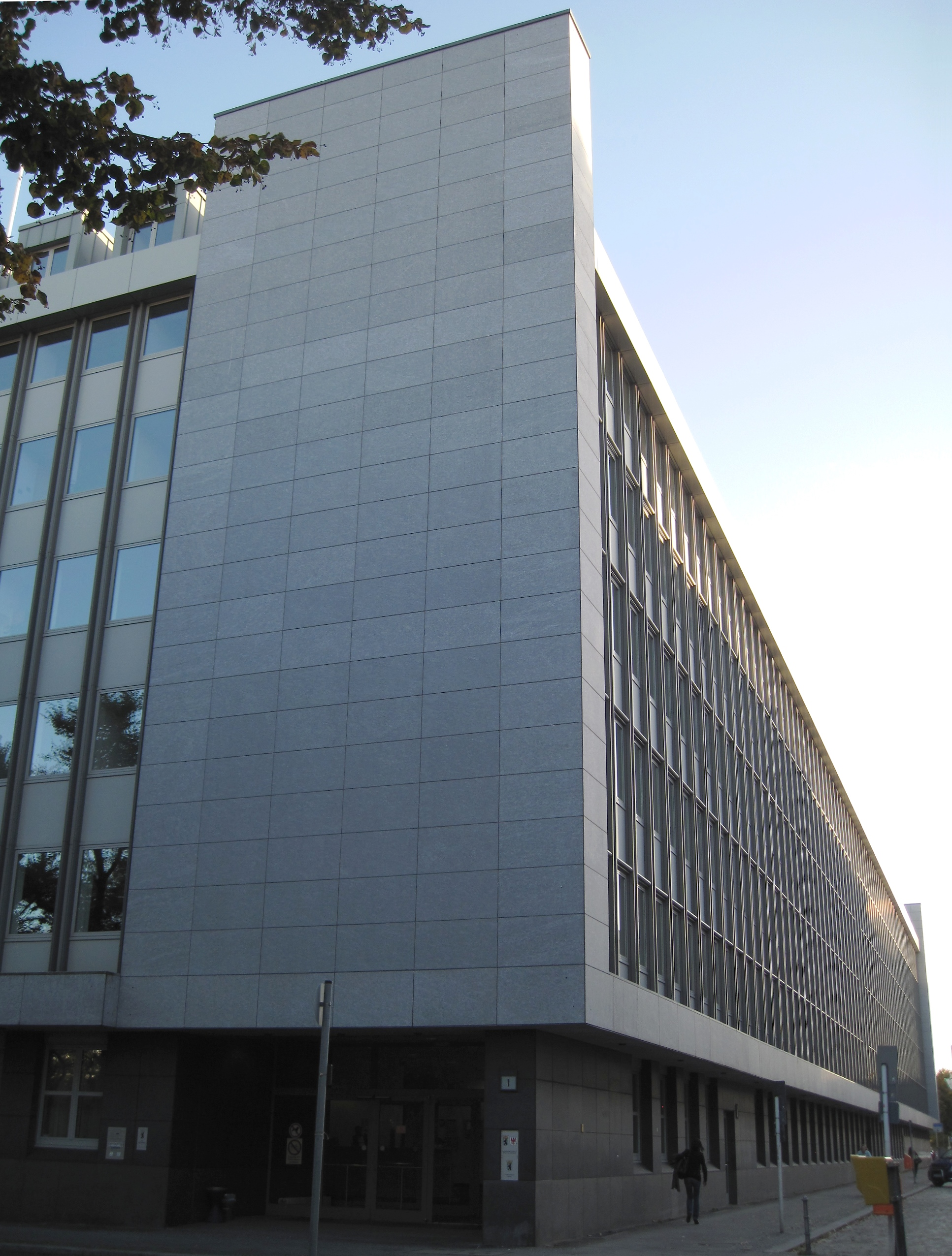 Arbeitsgericht und Landesarbeitsgericht in Berlin, Magdeburger Platz 1.